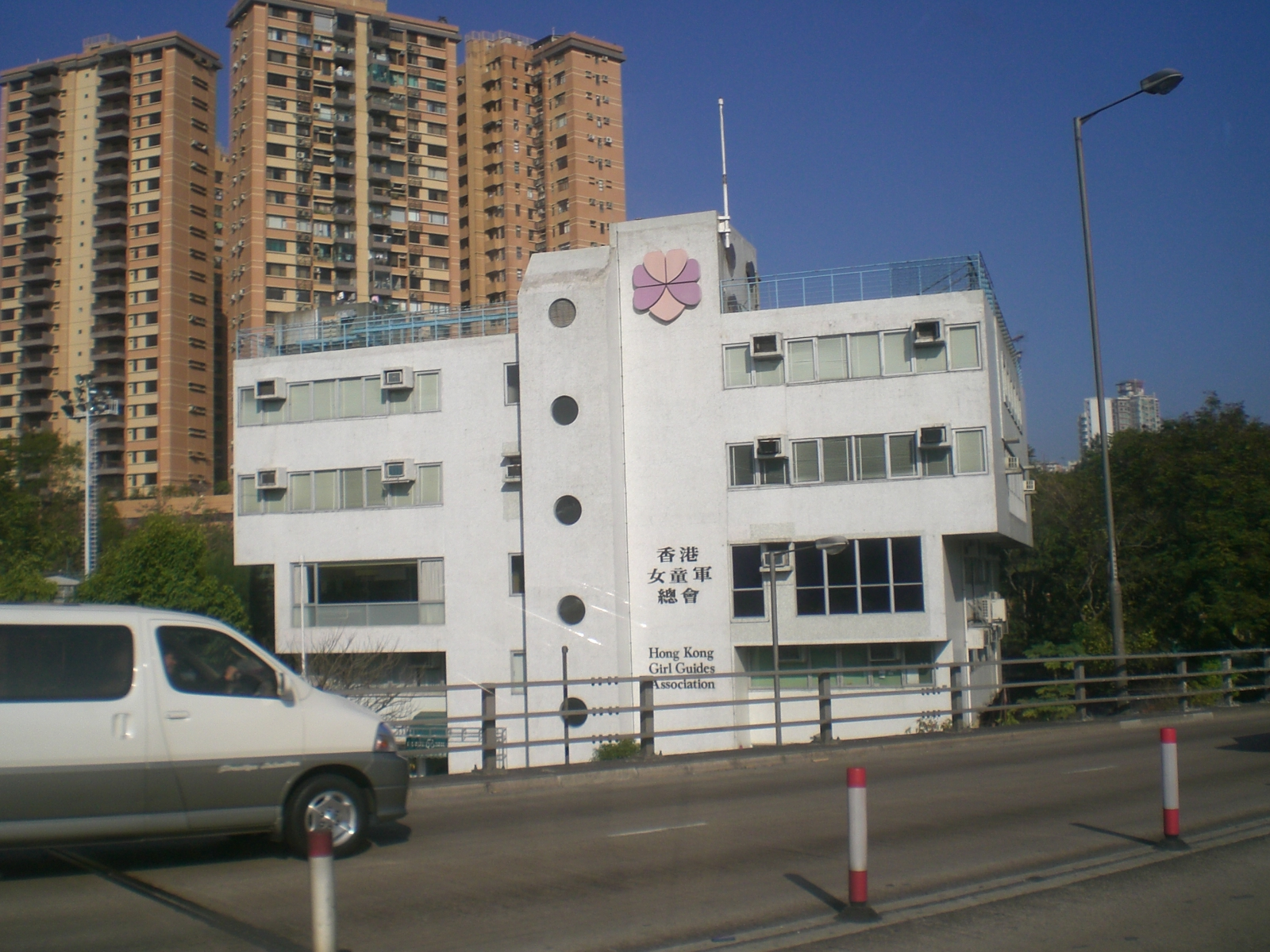 香港京士柏加士居道香港女童軍總會 [1]